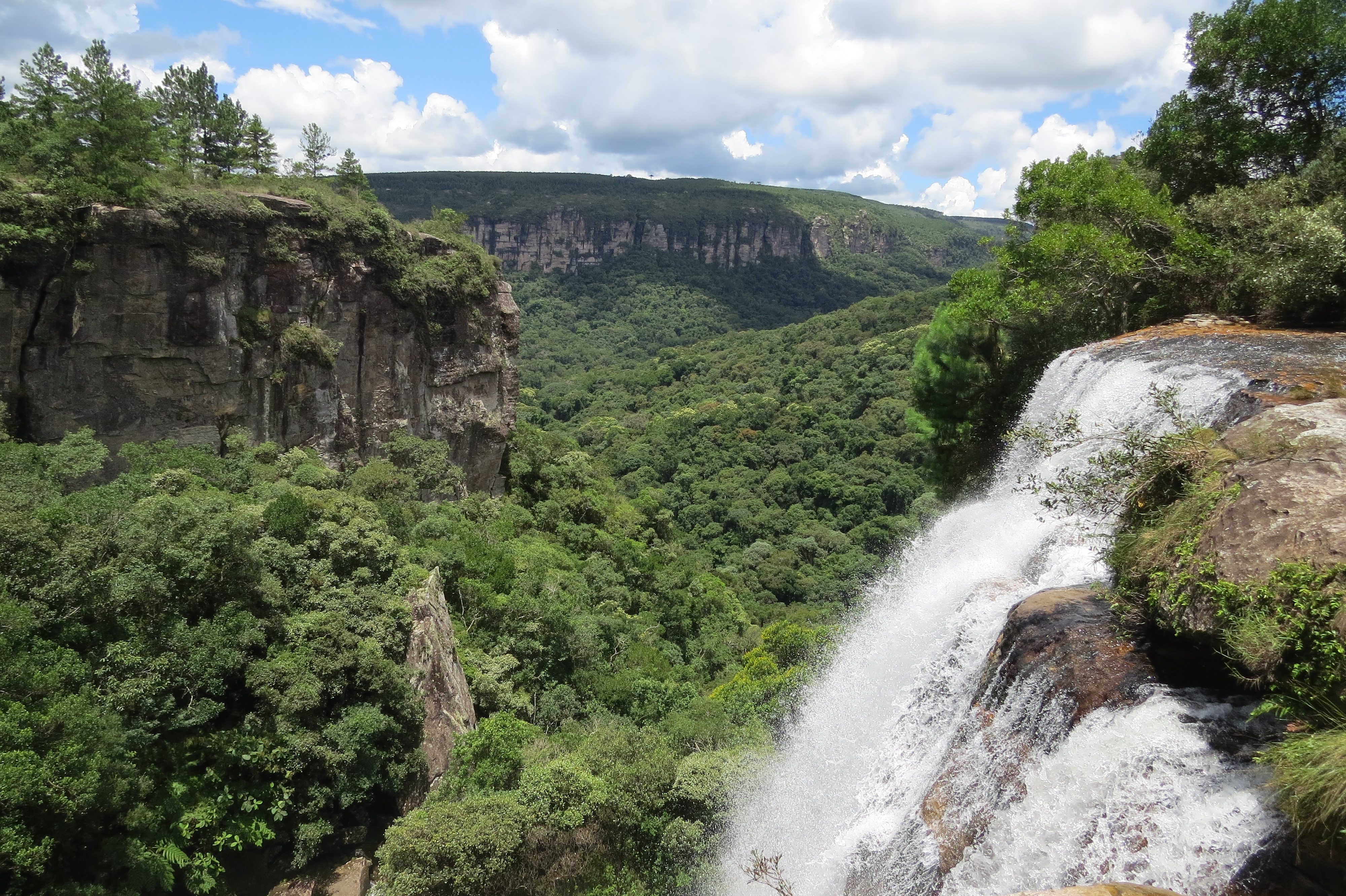 Cachoeira do Butia a esquerda e ao fundo exuberante vegetação, foto tirada no município de Jaguariaíva -SP.